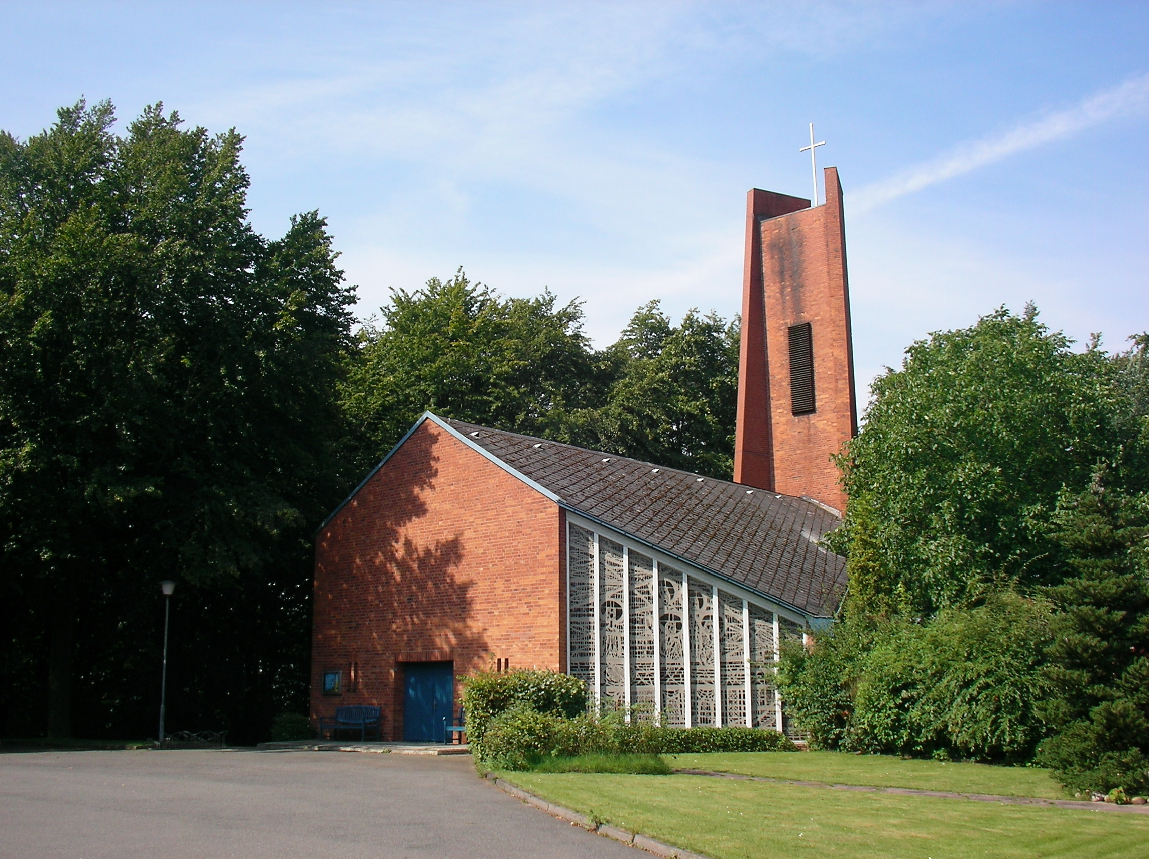 Börnsen - Heilig-Kreuz-Kirche